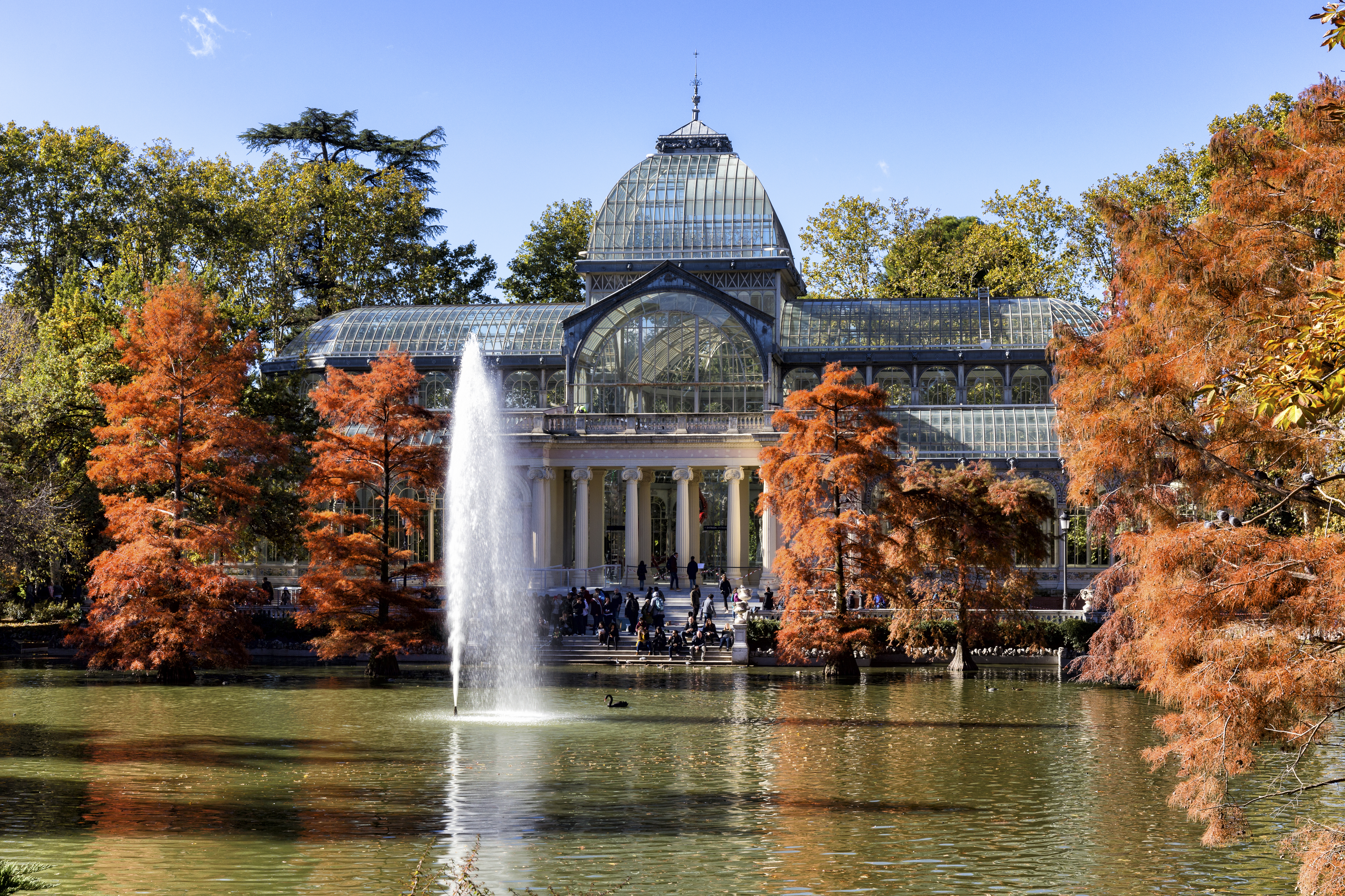 Retiro, Madrid.